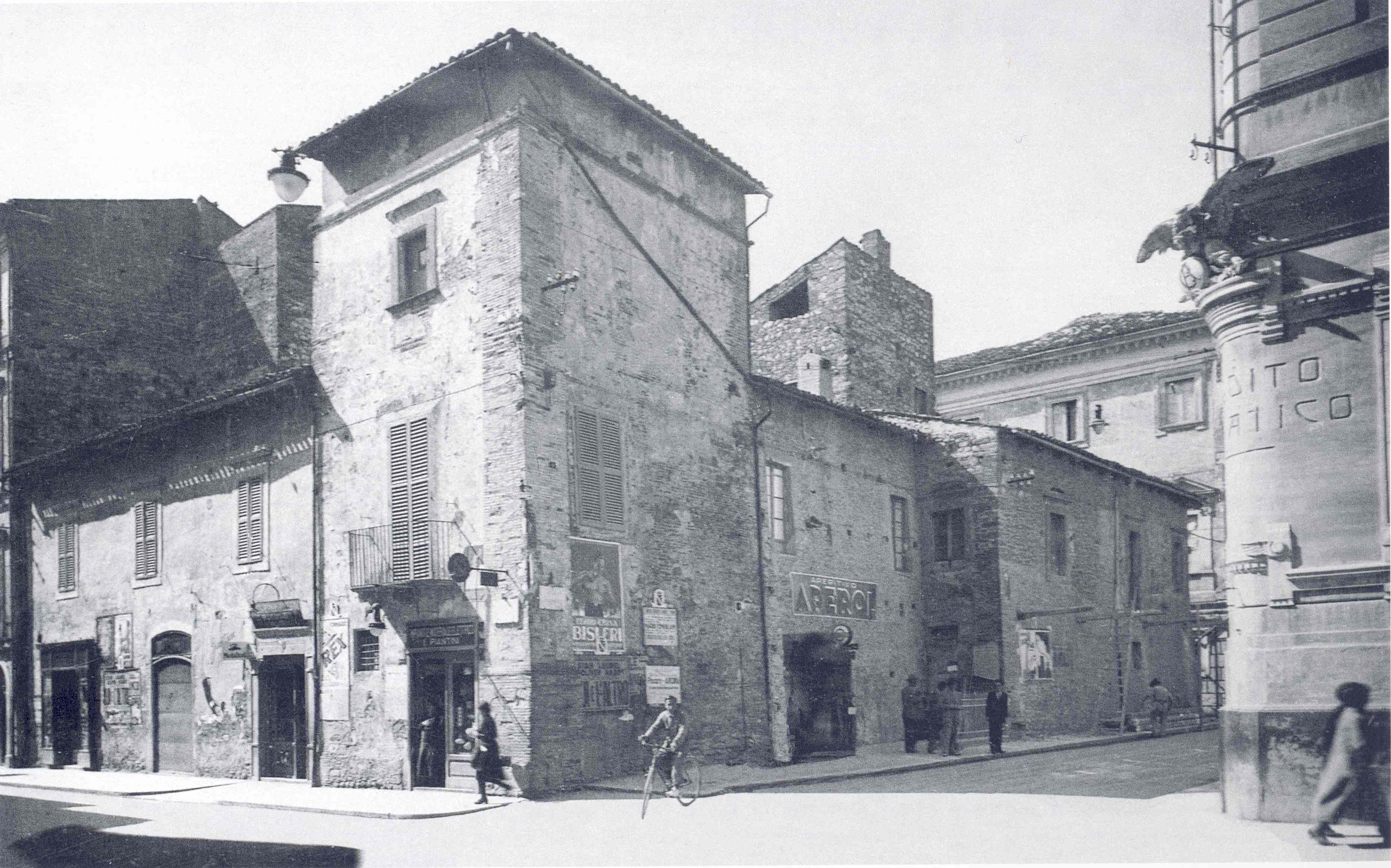 autore sconosciuto, riproduzione da fotografia originale, casa dei Delfico negli anni 30, opera il cui autore è morto da più di 70 anni, acquisita da scanner.